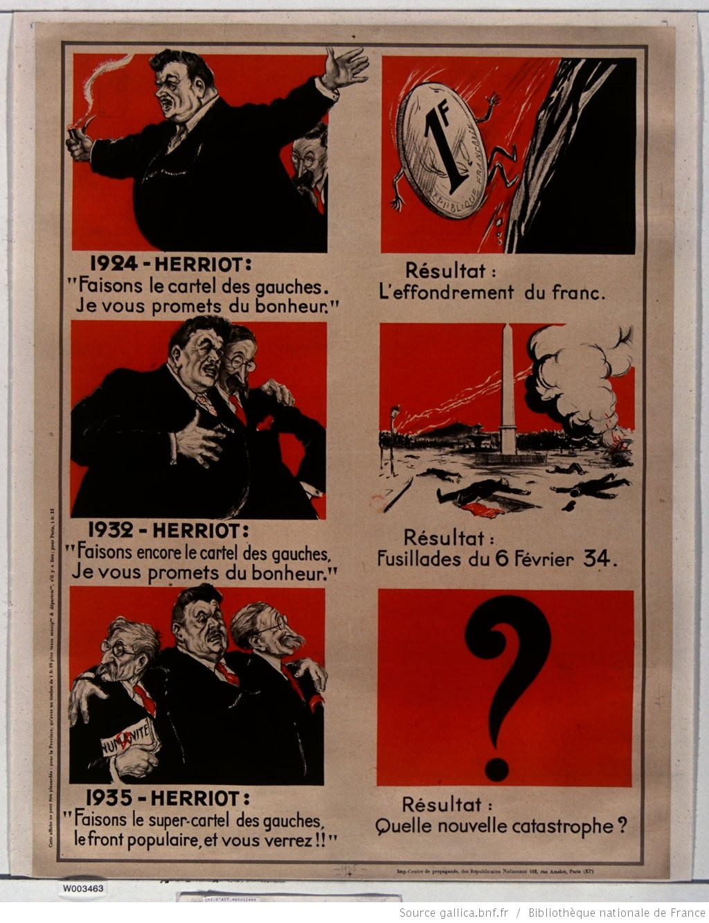 Affiche éditée par le Centre de propagande des républicains nationaux à l'occasion des élections de 1936.